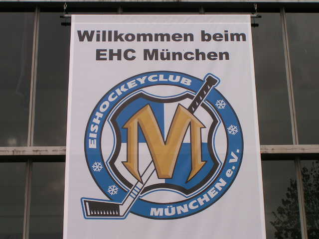 EHC München Banner an der Münchner Eishalle